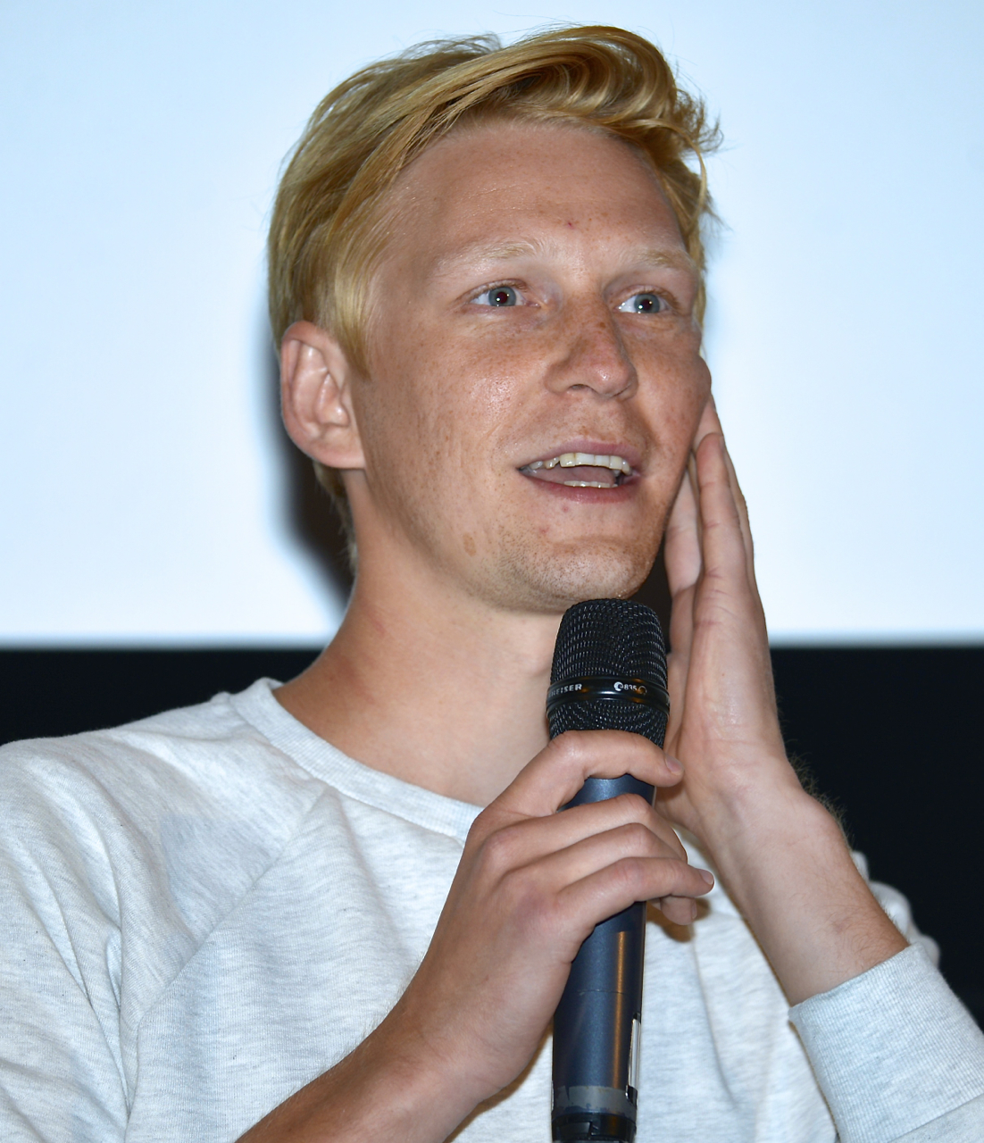 Anton Lundqvist under presentationen av den Svenska filmhösten 2014 i Filmhuset i Stockholm den 18 augusti 2014.